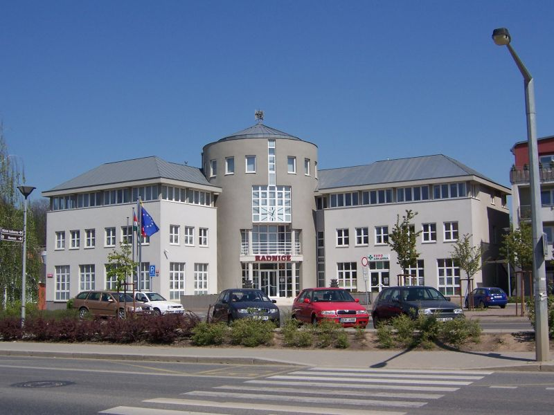 Praha-Uhříněves, radnice MČ Praha 22 / Prague-Uhříněves, town hall Prague 22